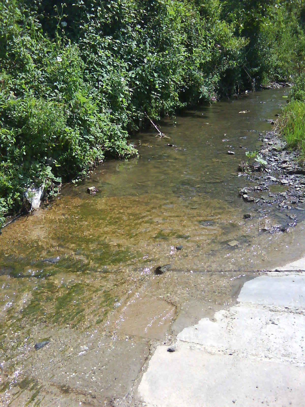 Autor Nenad Marković